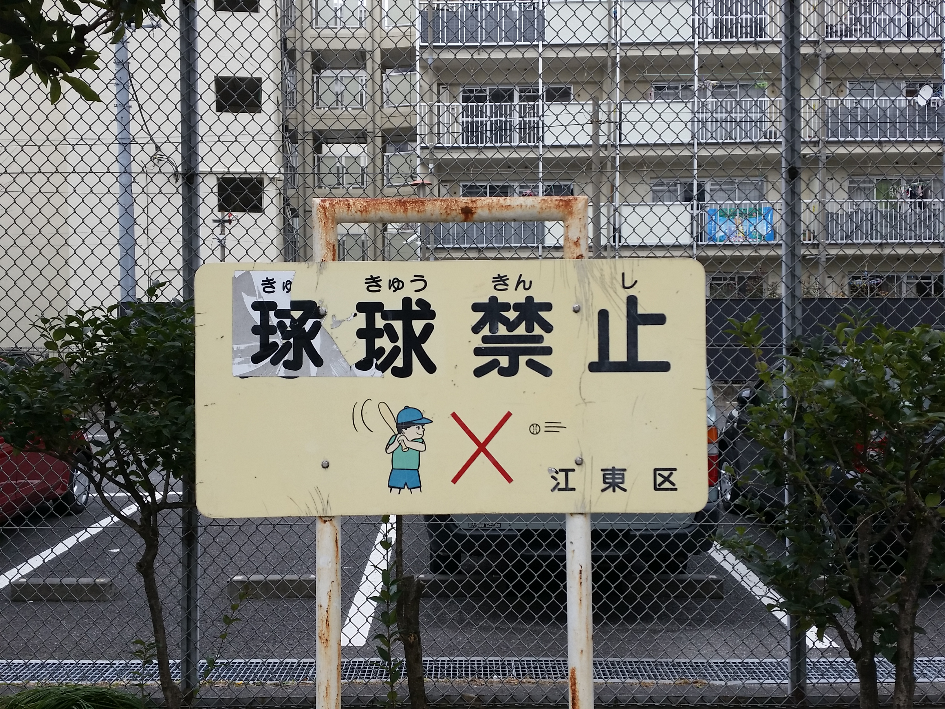 それにしても、ここ、結構持ってるなぁ。。 野球禁止 球技禁止 球球禁止